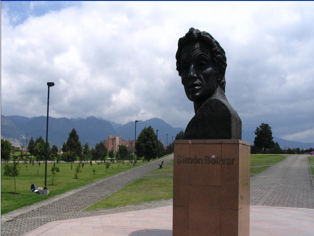 Escultura del Libertador en el Parque Simón Bolívar de Bogotá